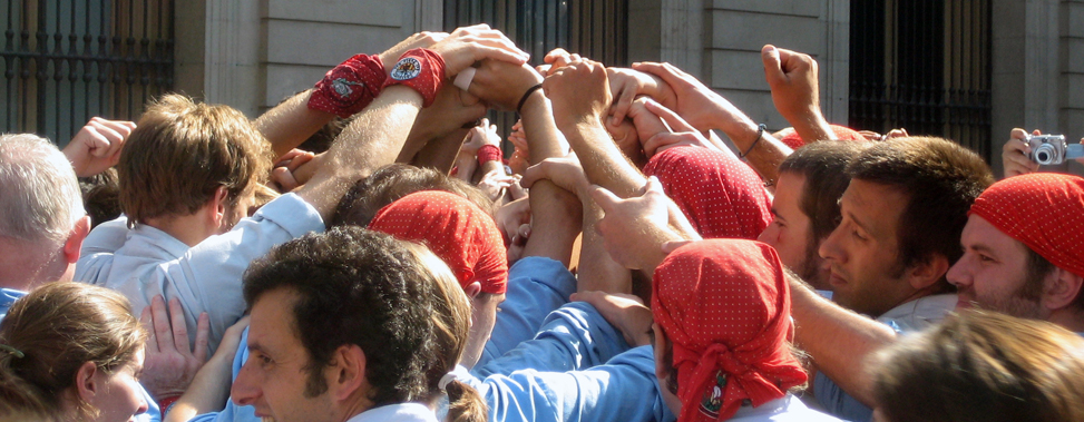 Preparant la pinya d'un castell, a la plaça de Sant Jaume de Barcelona durant les festes de la Mercè del 2007